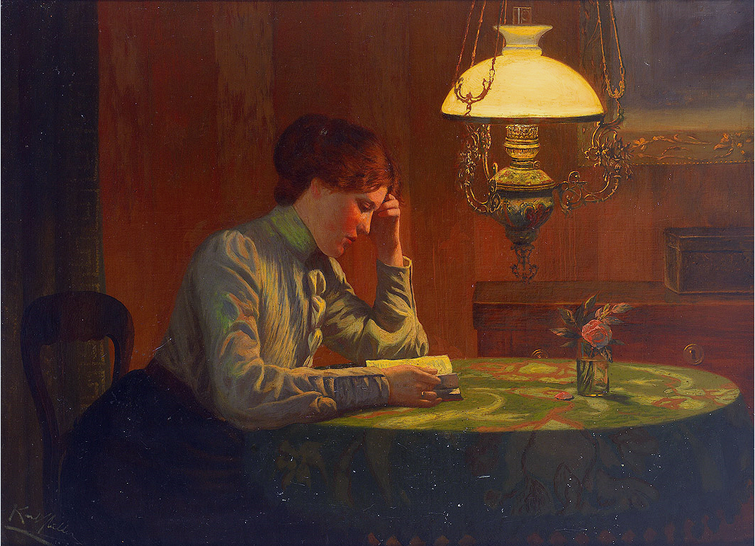 Karl Müller: Lesende junge Frau an einem Tisch beim Licht der Petroleumlampe, Öl auf Leinwand; 48 x 67 cm. Von Zeller falsch zugeschrieben. Die Signatur ist von dem Hamburger Karl Müller (Karl Josef Müller) Karl Josef Müller